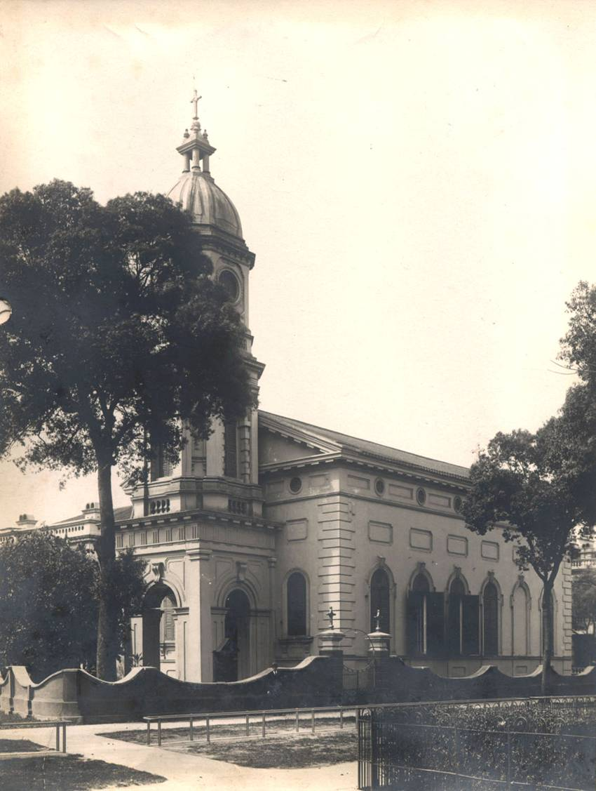 廣東省城（廣州）沙面島上的英格蘭聖公會教堂（現為沙面堂）